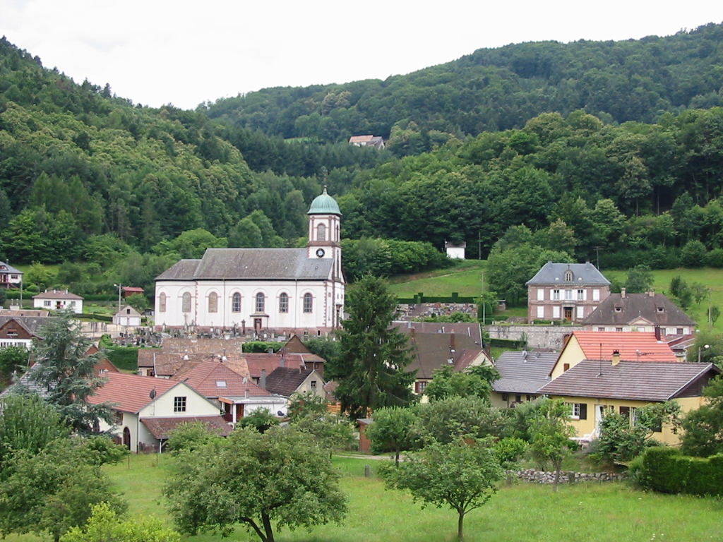 Église de Fréland (Haut-Rhin) vue de la salle des Fêtes.